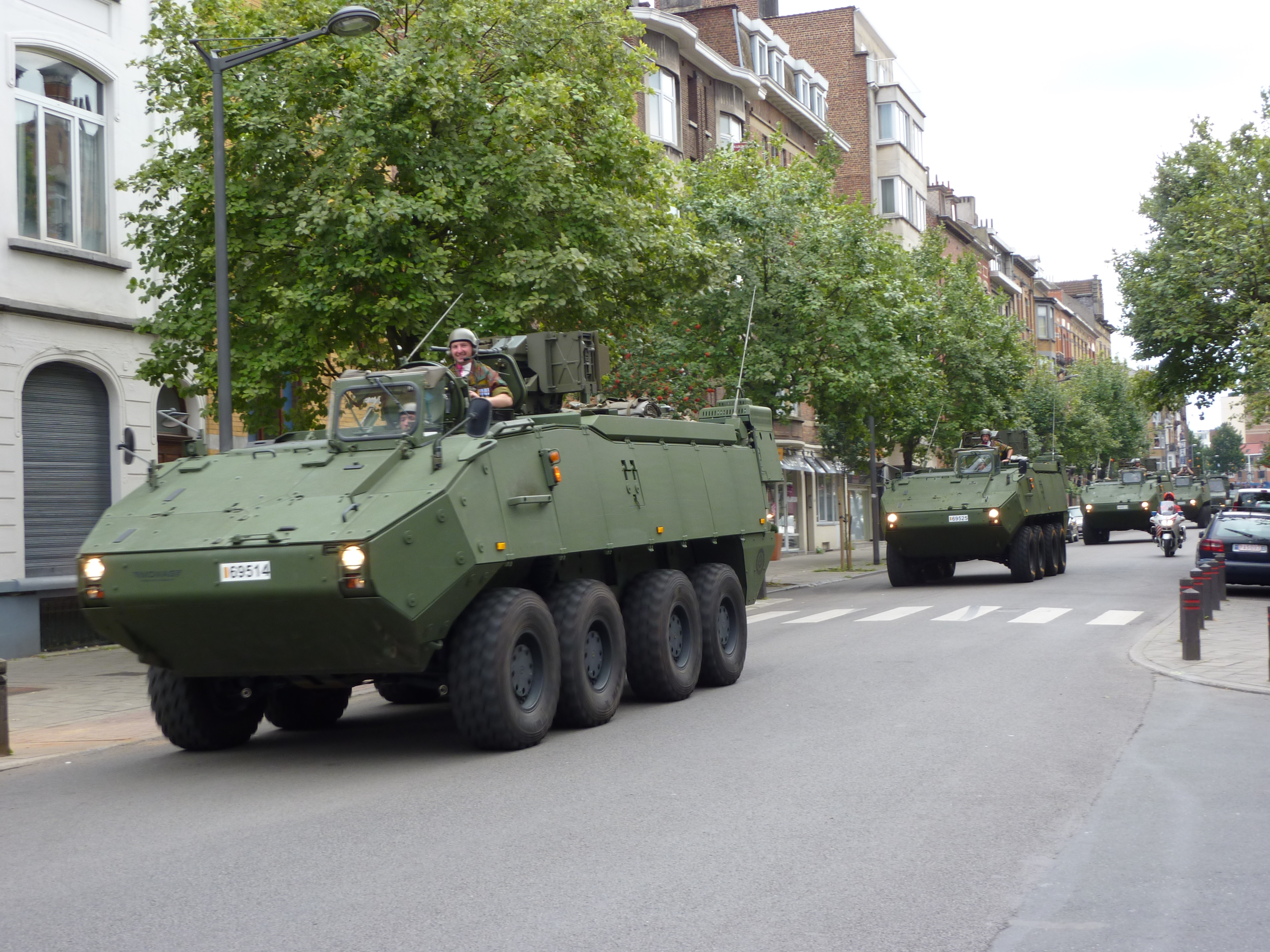 Fête nationale belge.